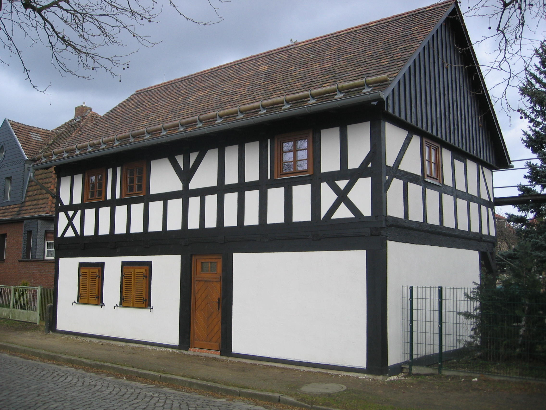 Ältestes Haus in der Stadt Ruhland, erbaut 1672, nach Restauration; Dresdener Straße 35, Ruhland; Denkmalschutz